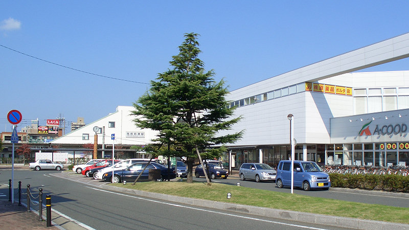 JR筑肥線筑前前原駅 南口